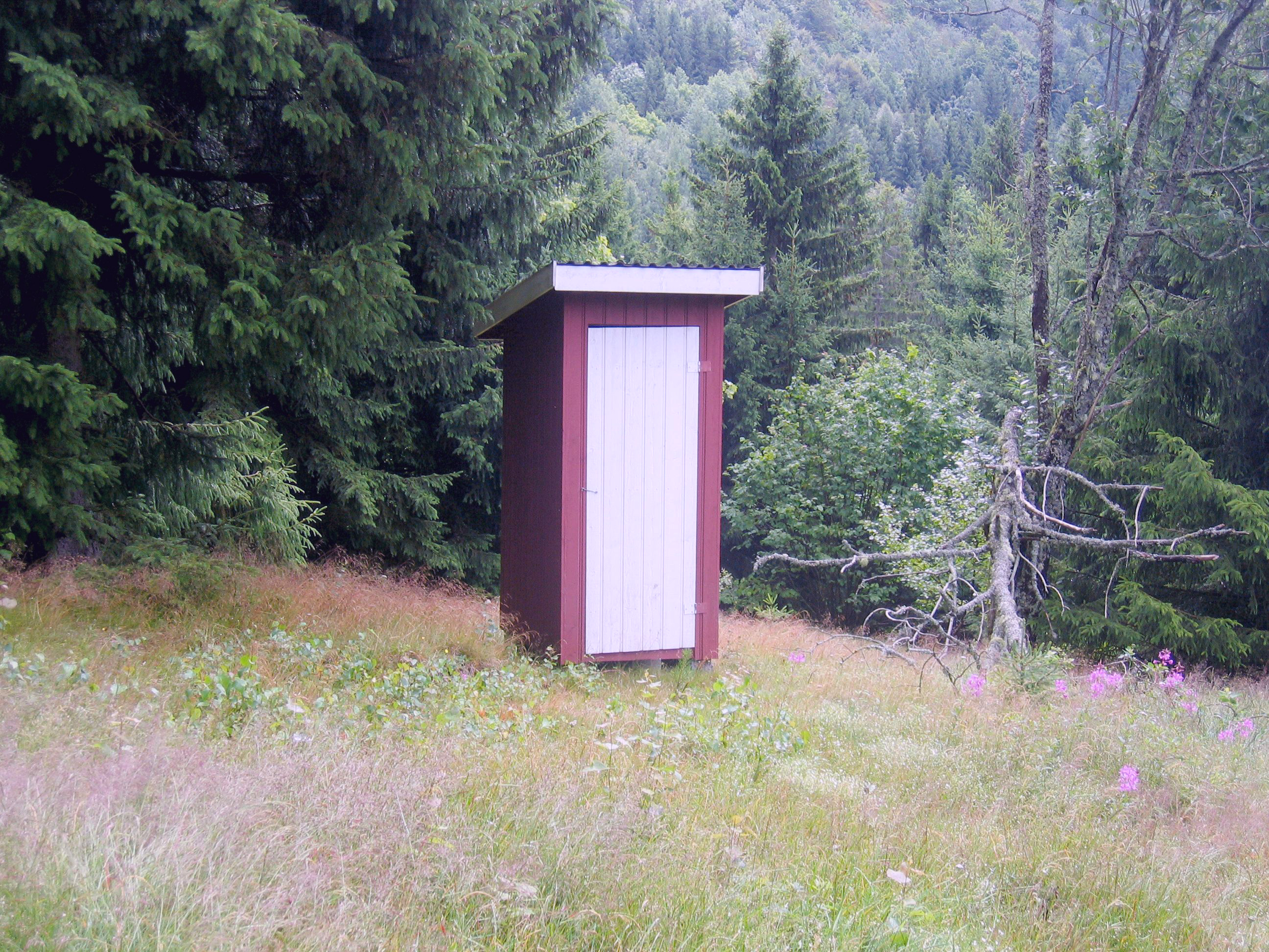 Utedo på setervoll. Hedrum i Larvik kommune i Vestfold.